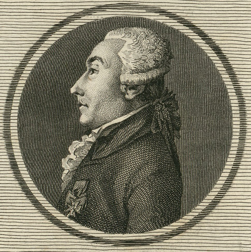 Joseph-Maurice de Toustain-Viray: né à Nanci en 1730 depute du baillage de Mirecourt à l'Assemblée nationale de 1789